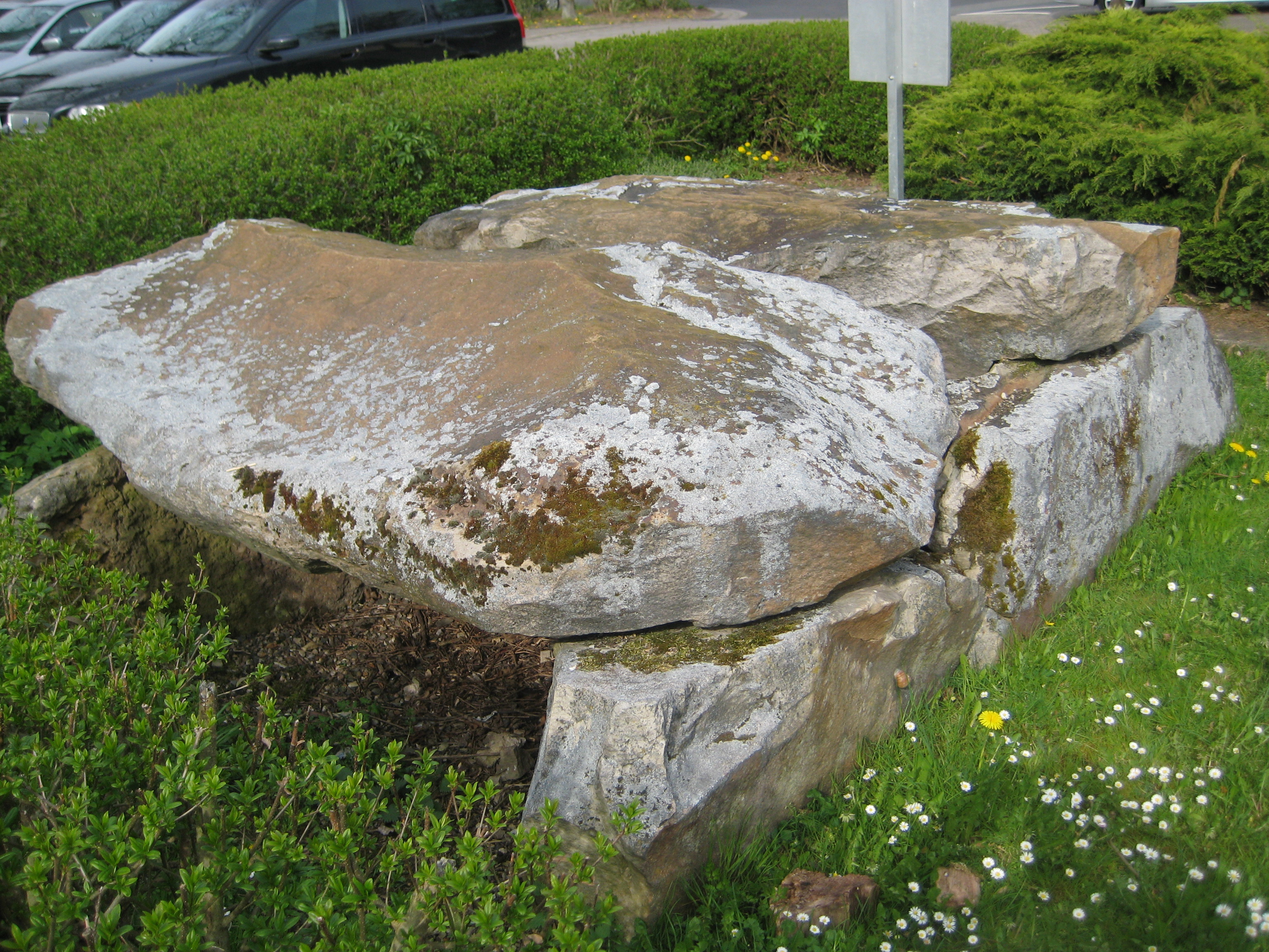 Steinkistengrab in Calden, Archäologischer Fund